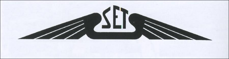 Sigla Societății de Exploatări Tehnice